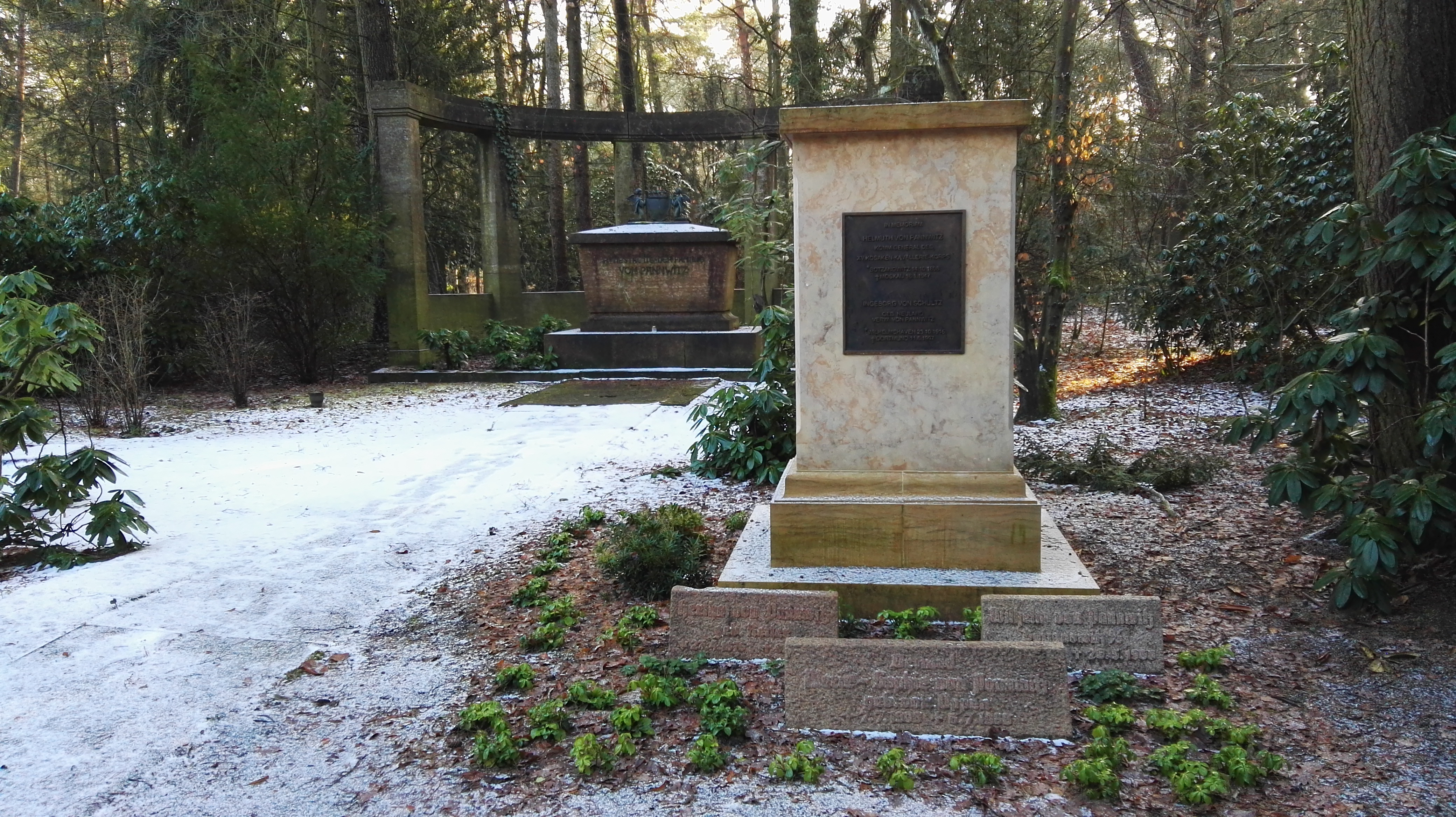 Grab von Helmuth von Pannwitz auf dem Südwestkirchhof Stahnsdorf